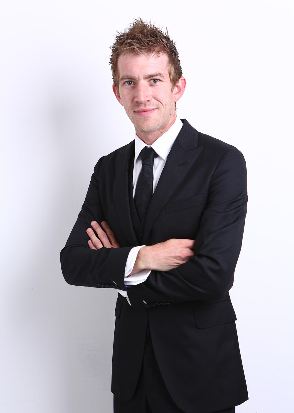 Imagen del Actor Danny D